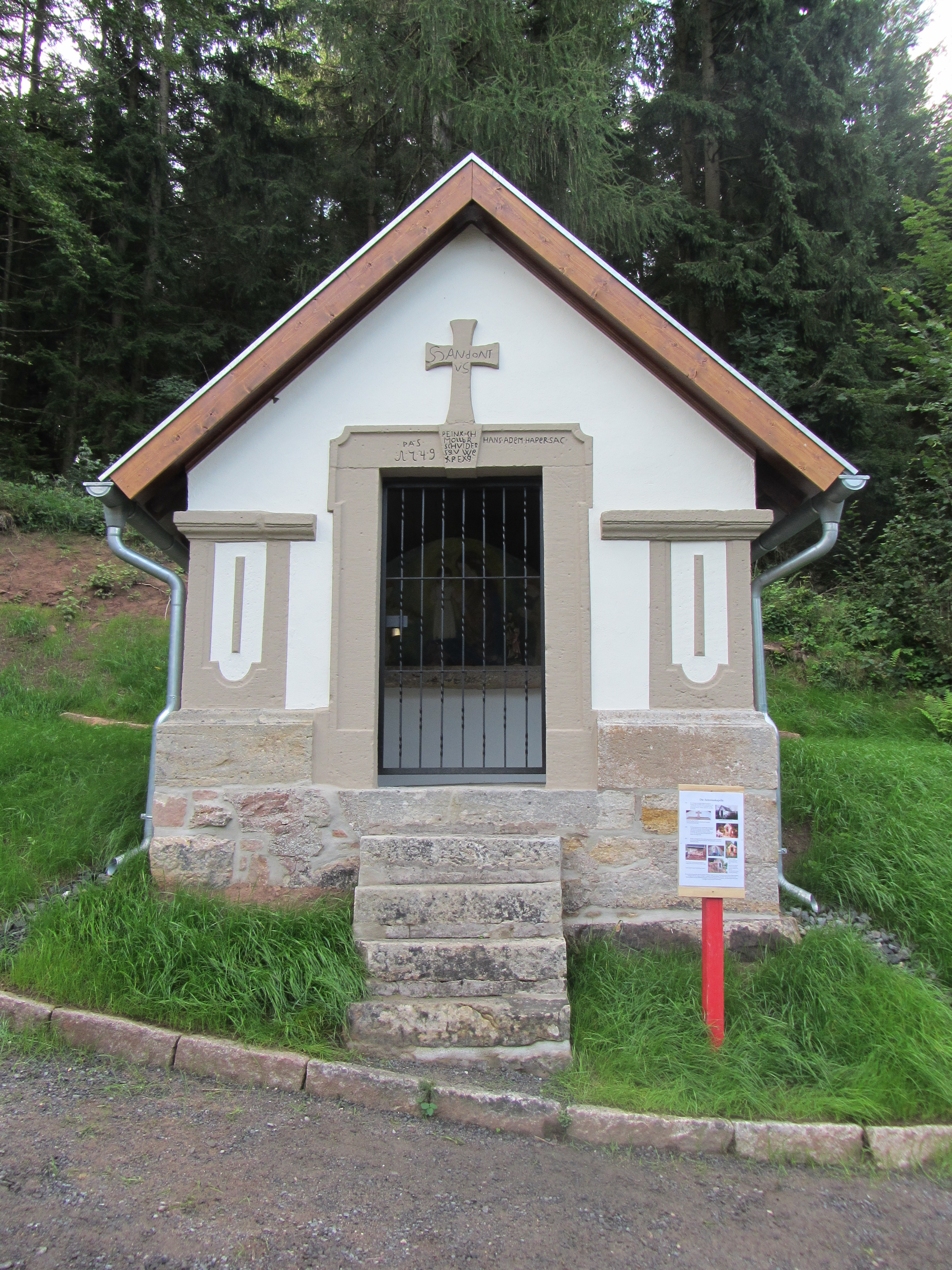 Die renovierte Antoniuskapelle unterhalb von Werberg